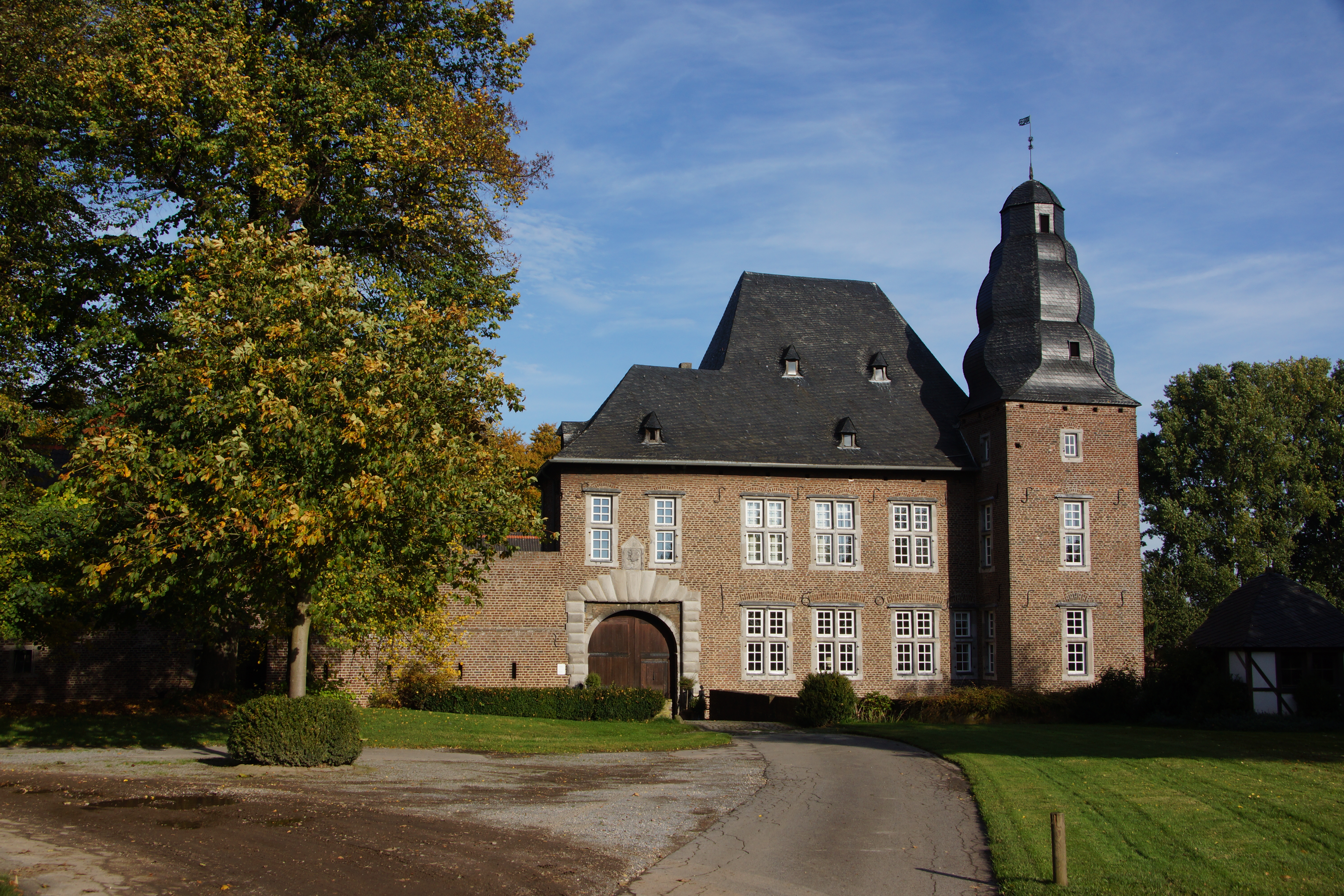 Gut Etgendorf, Denkmalliste Bedburg Nr. 17 This is a photograph of an architectural monument., no. 0